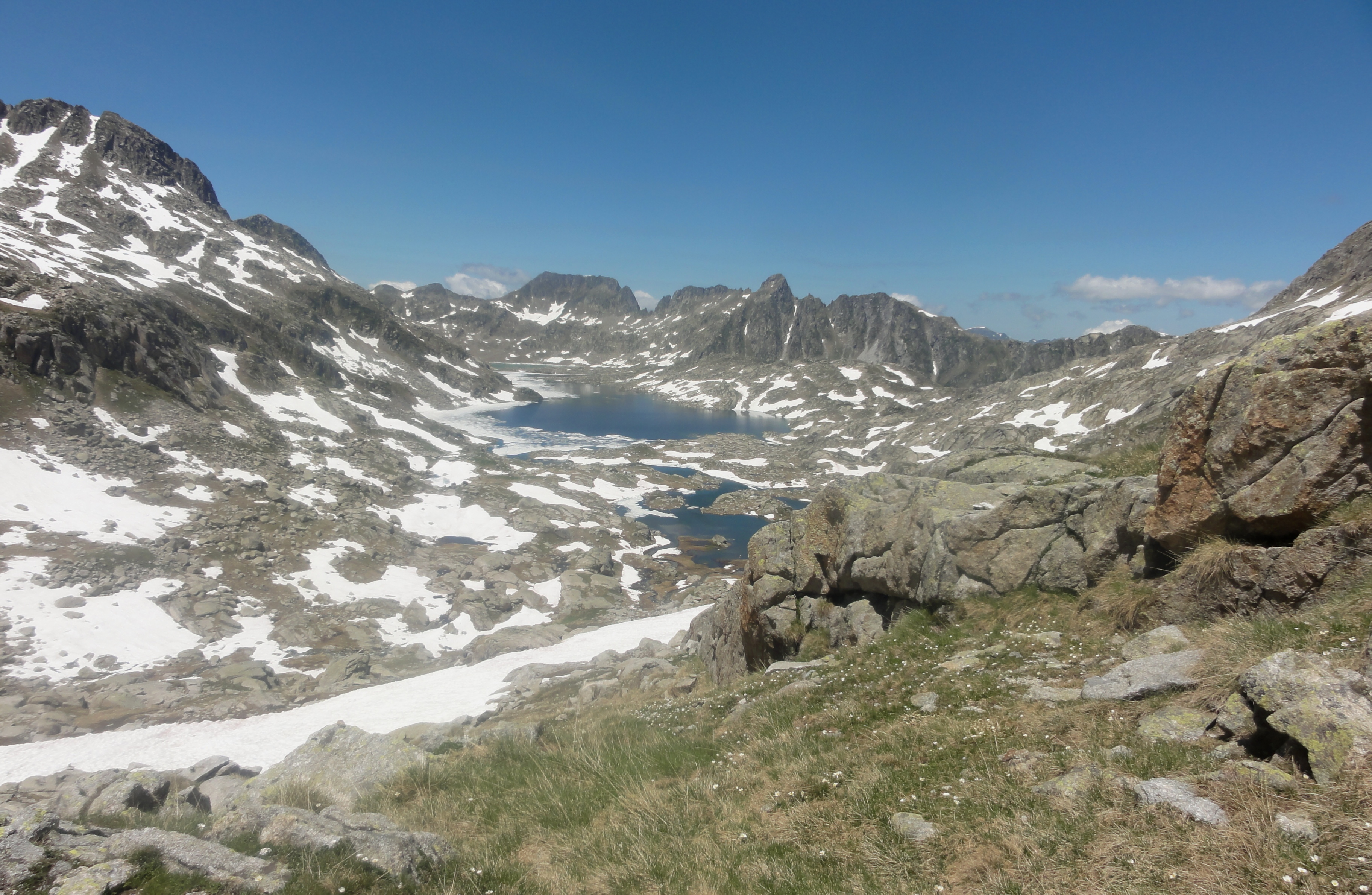 Aigüestortes This is a a photo of a natural area in Catalonia, Spain, with id: ES510081